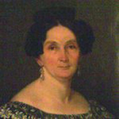 Josefa Sáenz del Campo. Óleo de autor desconocido. SXIX